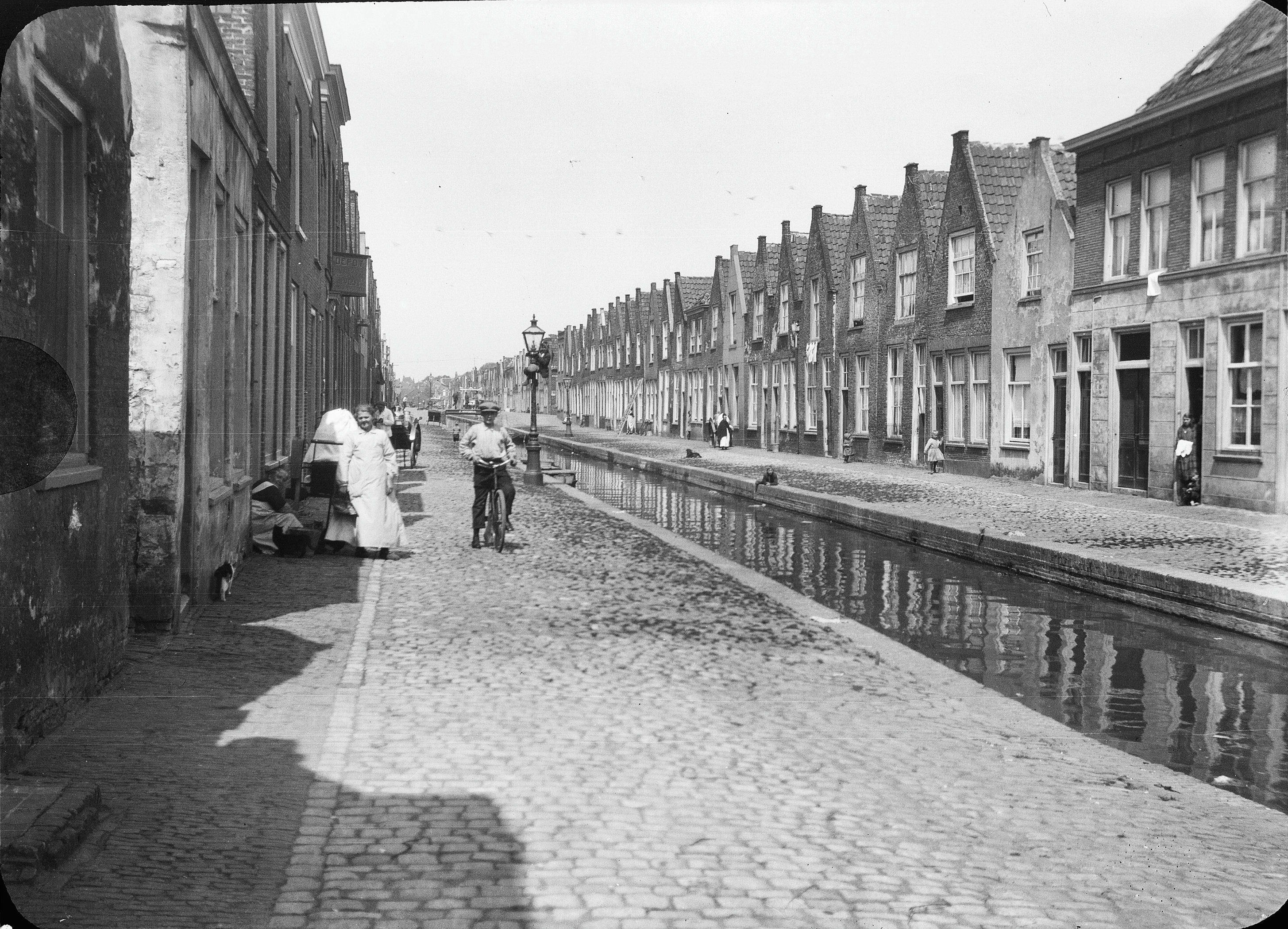 Woonhuizen W.: Waardgracht, overzicht